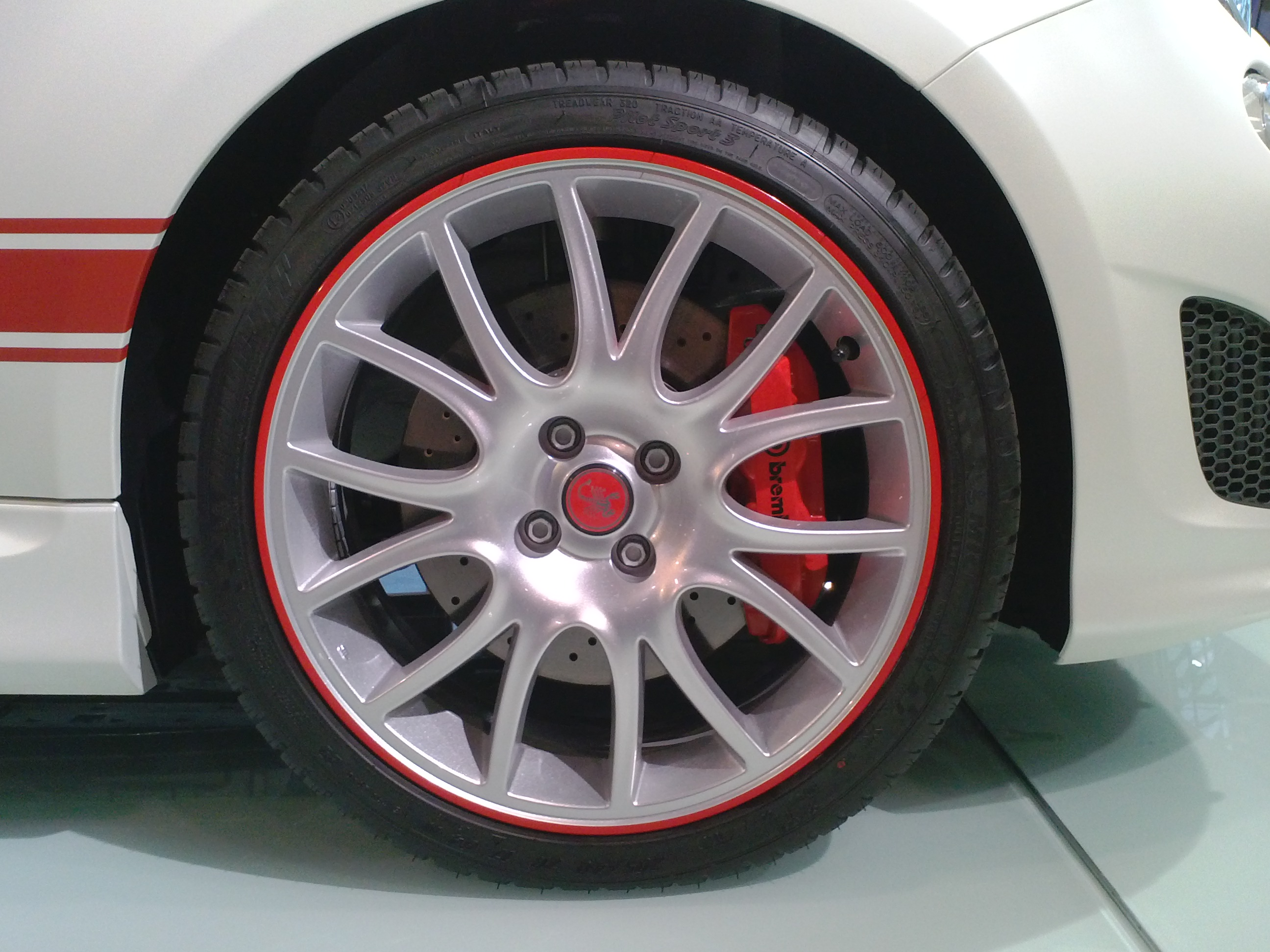 Abarth_595_50_Anniversario_freni